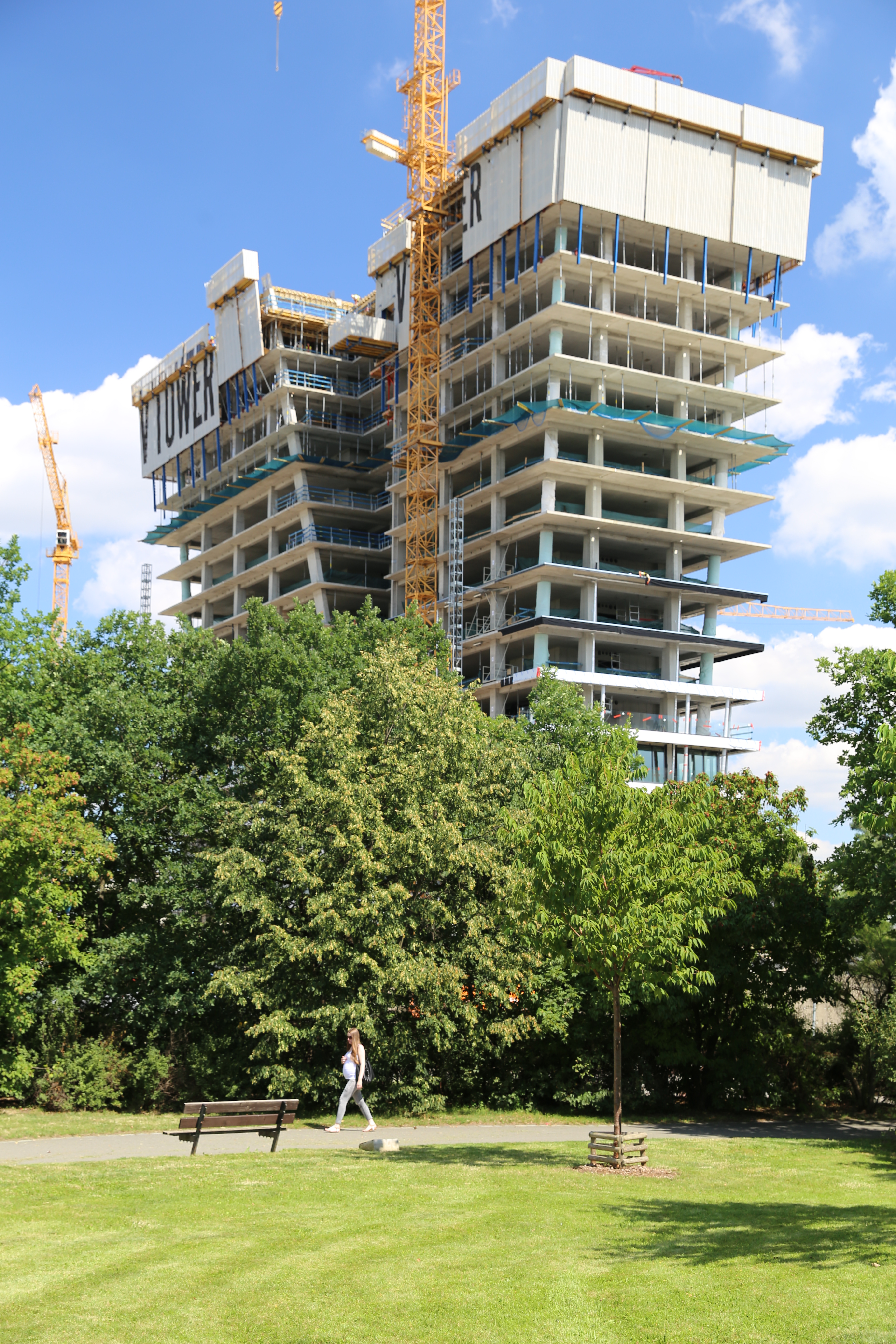 V Tower, Prague - průběh výstavby